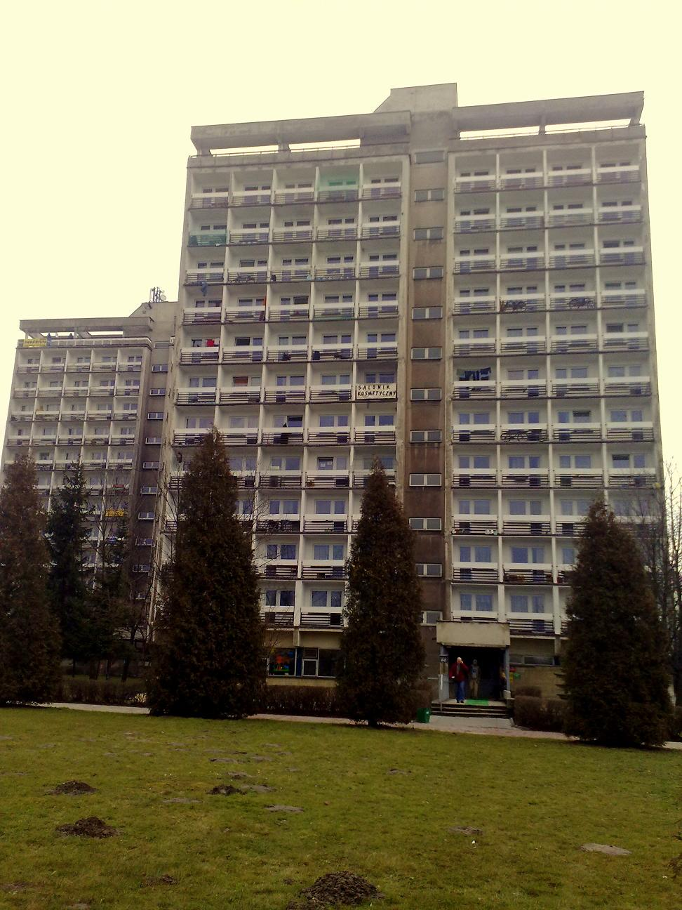 Akademiki AWF Kraków